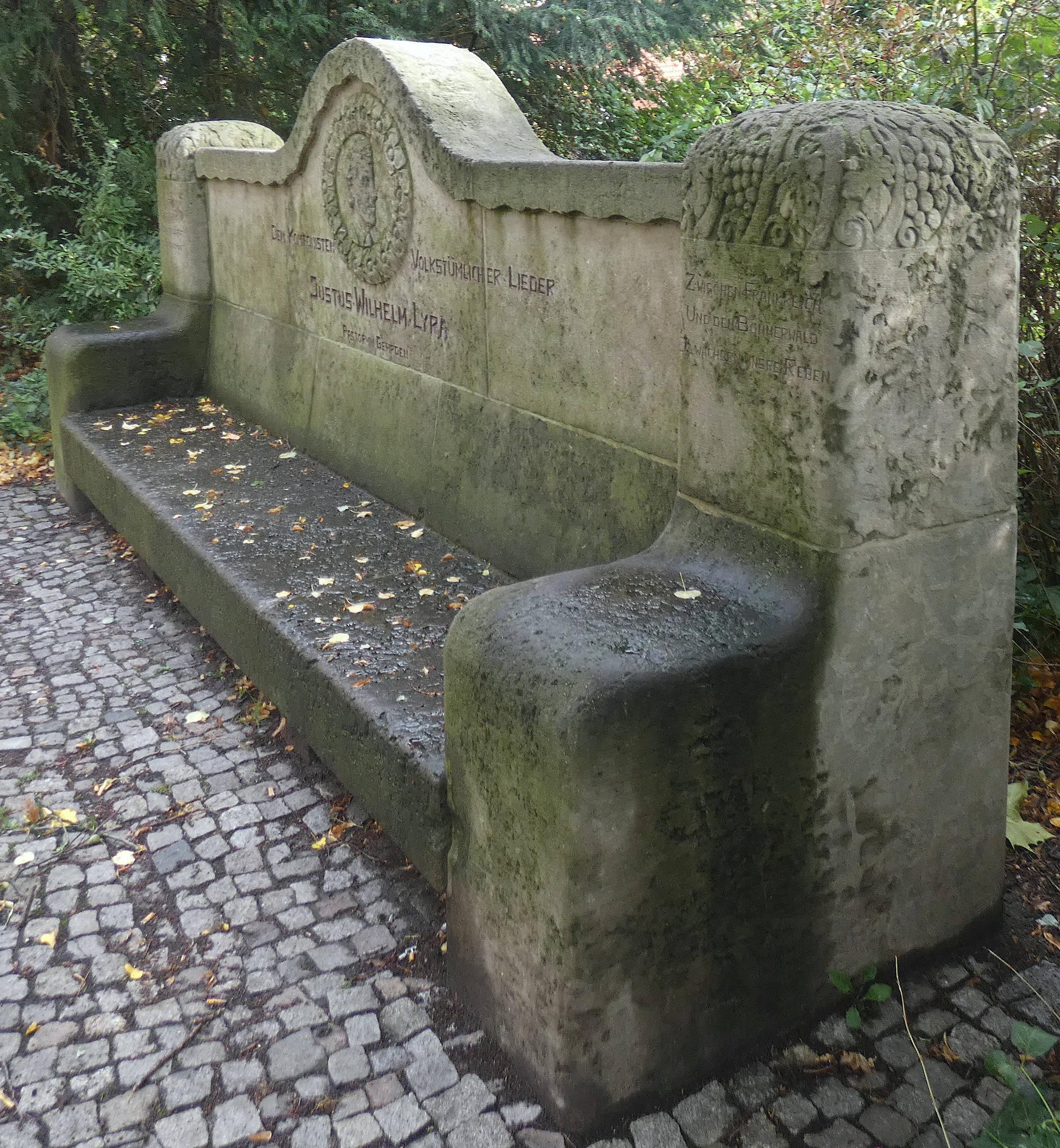 Die rechte Schrägansicht der Lyrabank auf dem Gehrdener Kirchhof. Zu erkennen sind die Verzierungen und Inschriften an der Rücklehne und der rechten Seitenlehne